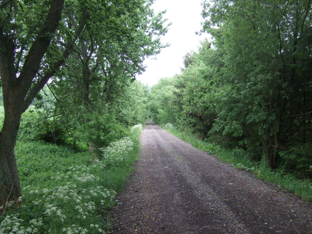 Thomm, Alte Poststrasse